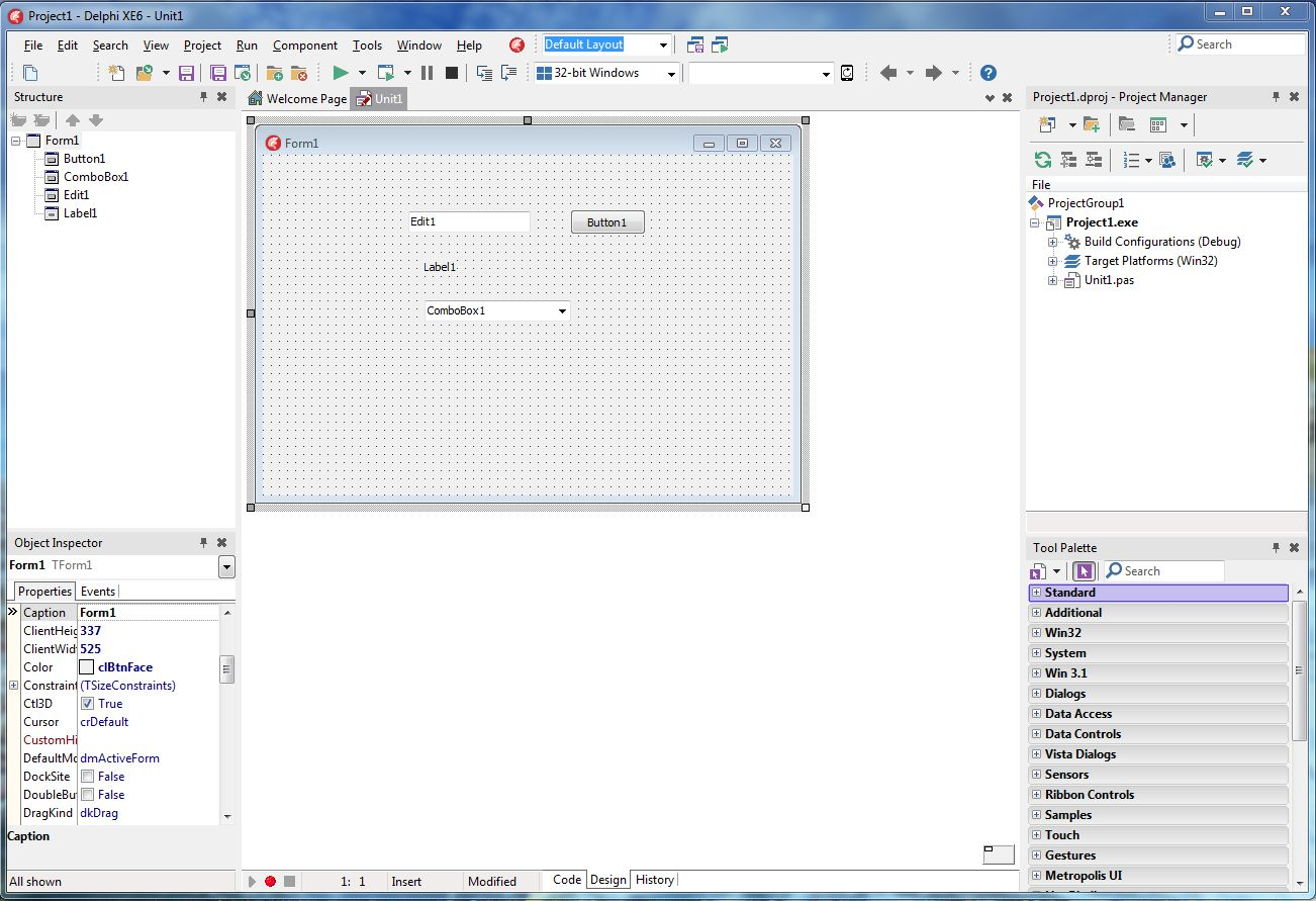 Delphi XE6 IDE